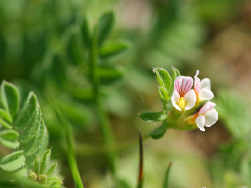 Kleiner Vogelfuß (Ornithopus perpusillus)